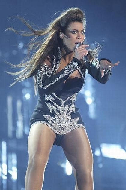 Beyonce durante el I am... Tour en Vancouver Canada